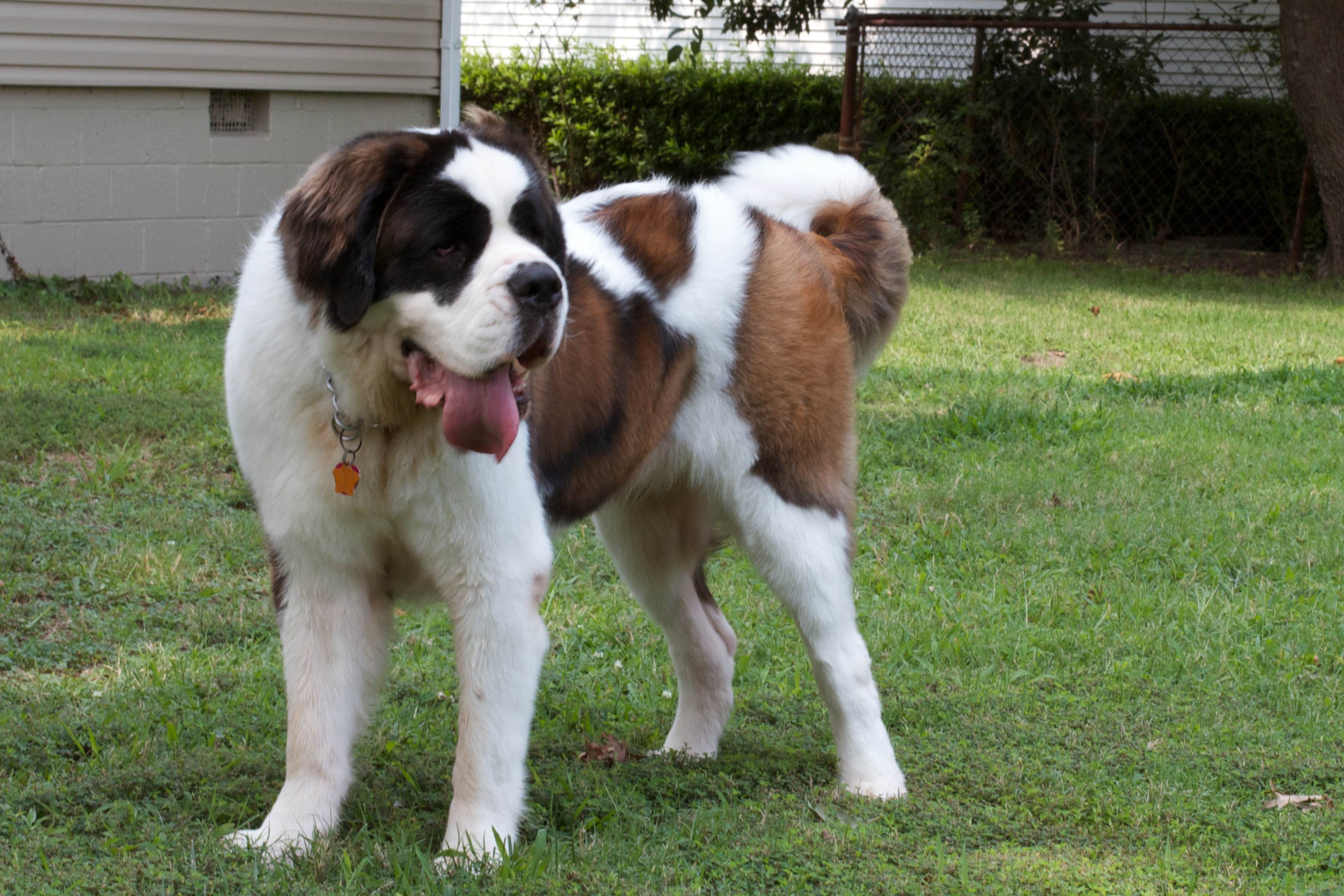 St. Bernard Dog